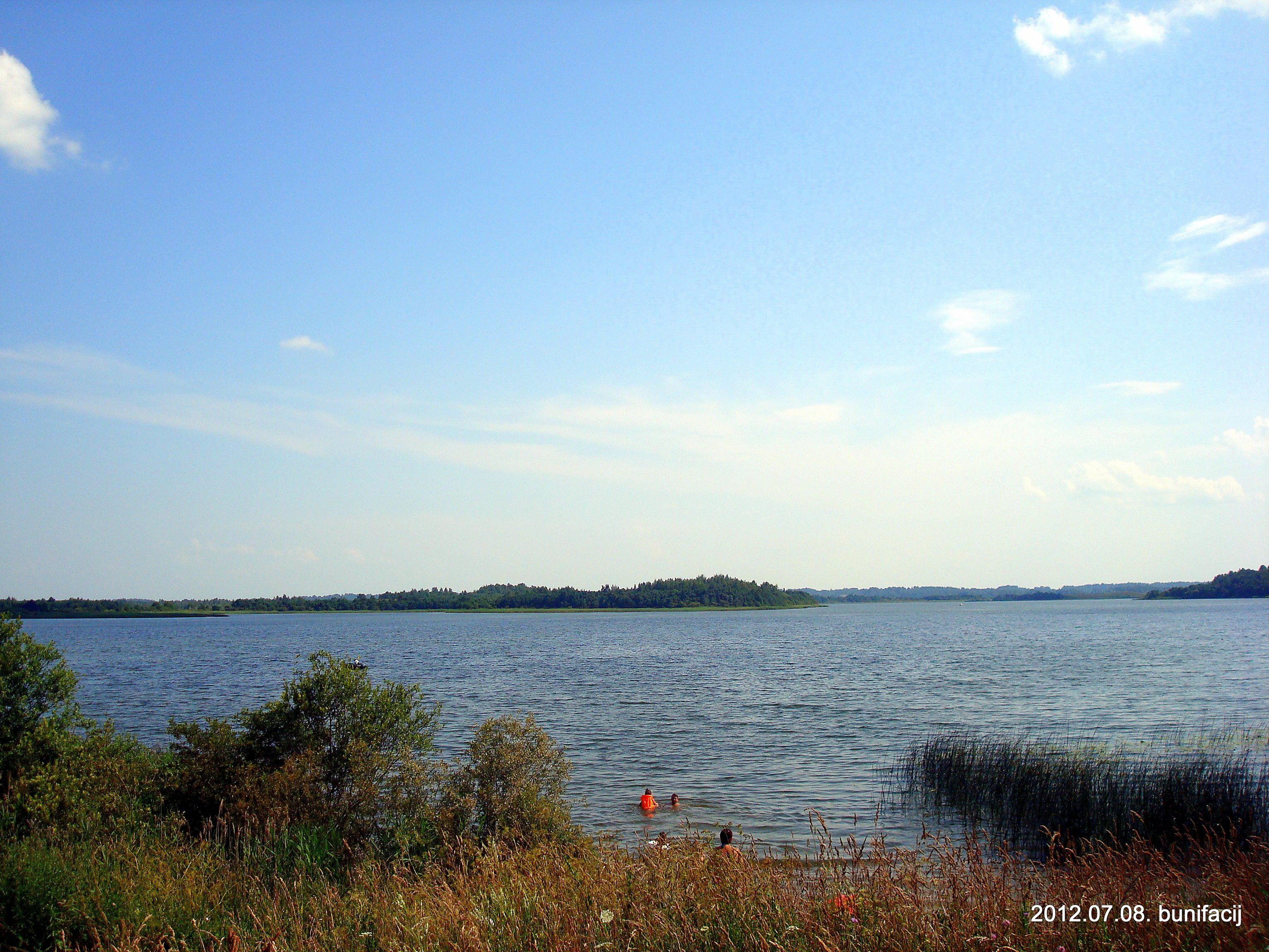 Озеро Отолово